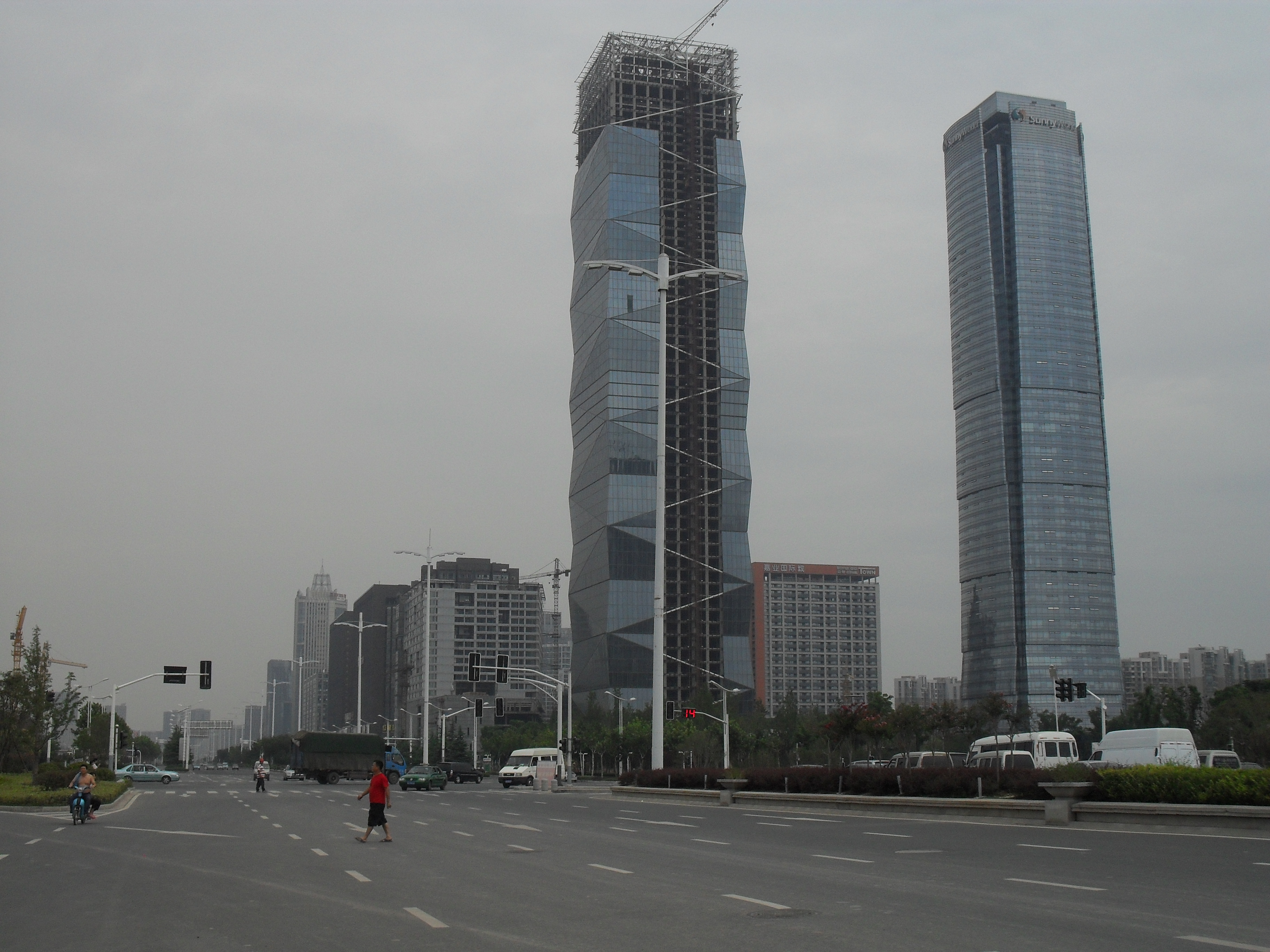 南京卢山路